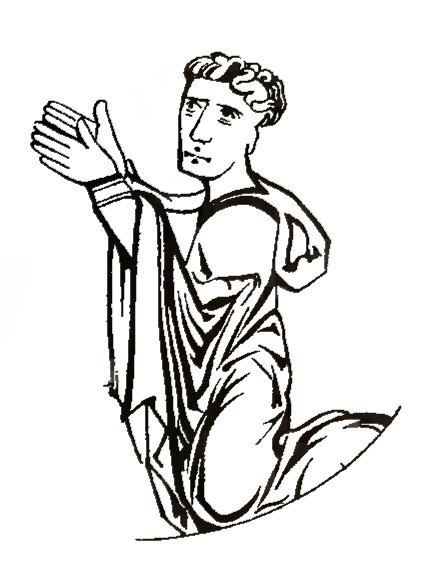 Kazimierz I kujawski on paten of Płock (XIII century)